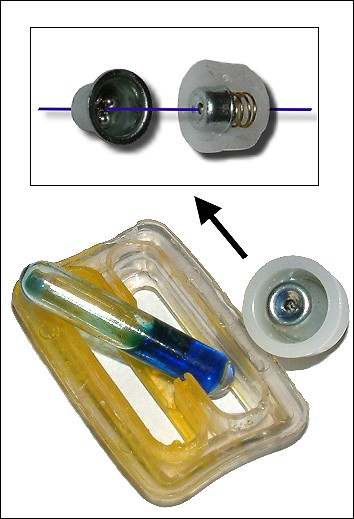 Mechanisches Diebstahlsicherungsetikett